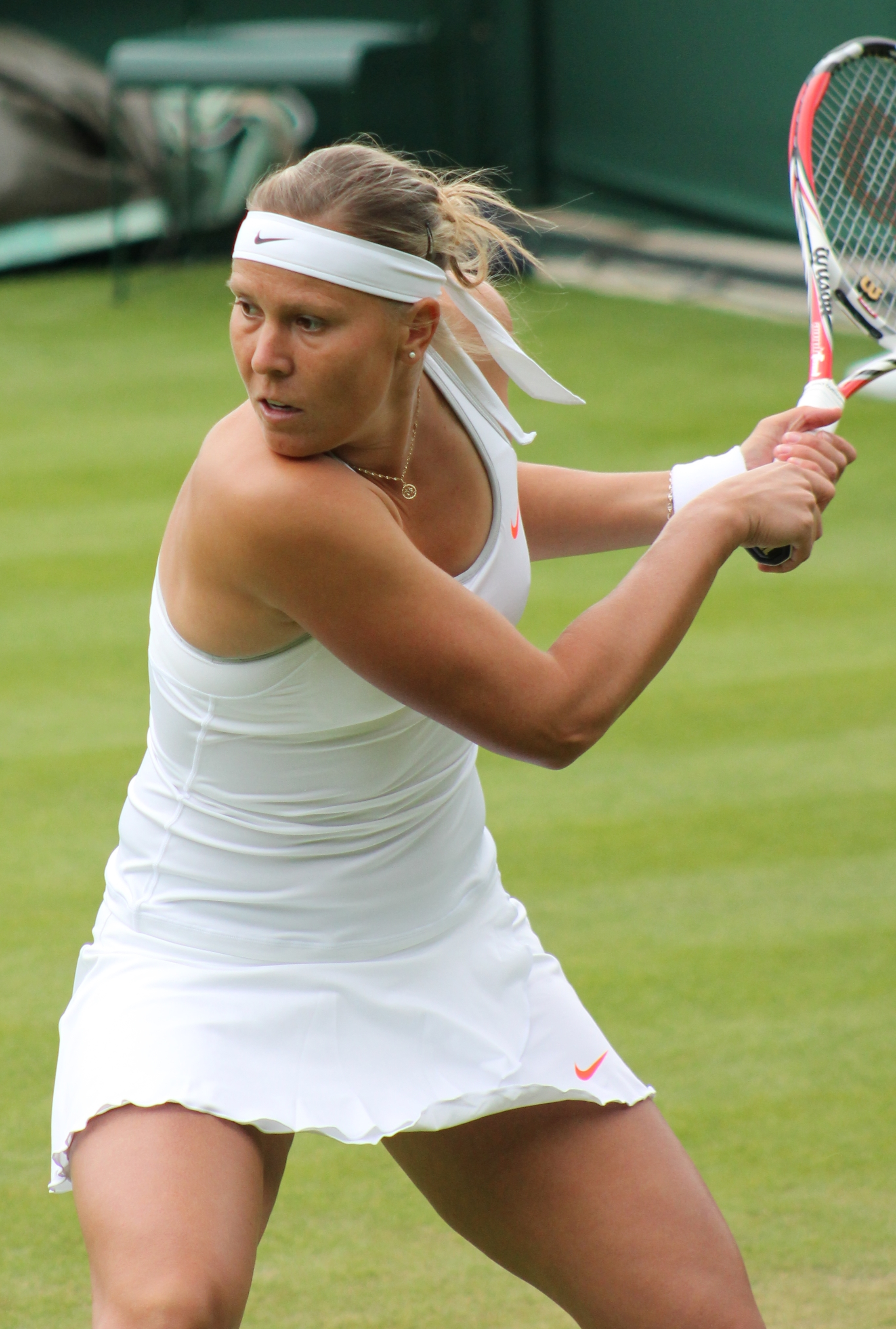 Hradecka WM13-002